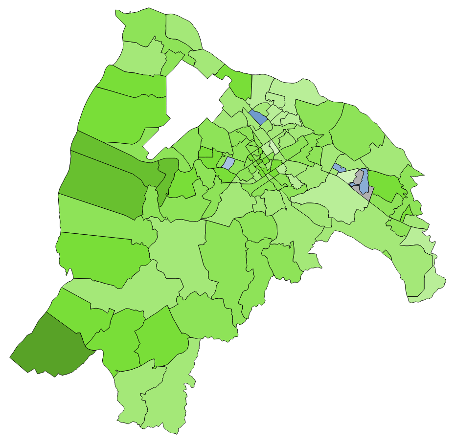 顏色對照表